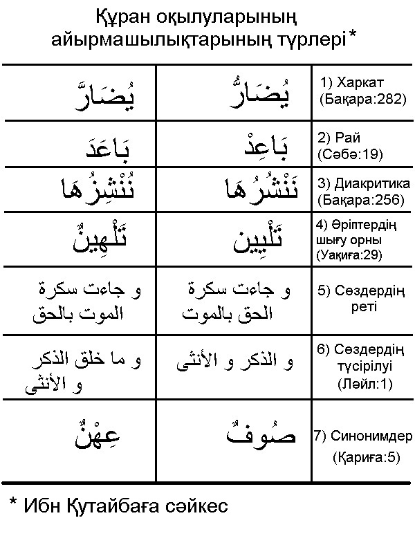 Виды разночтений в Коране